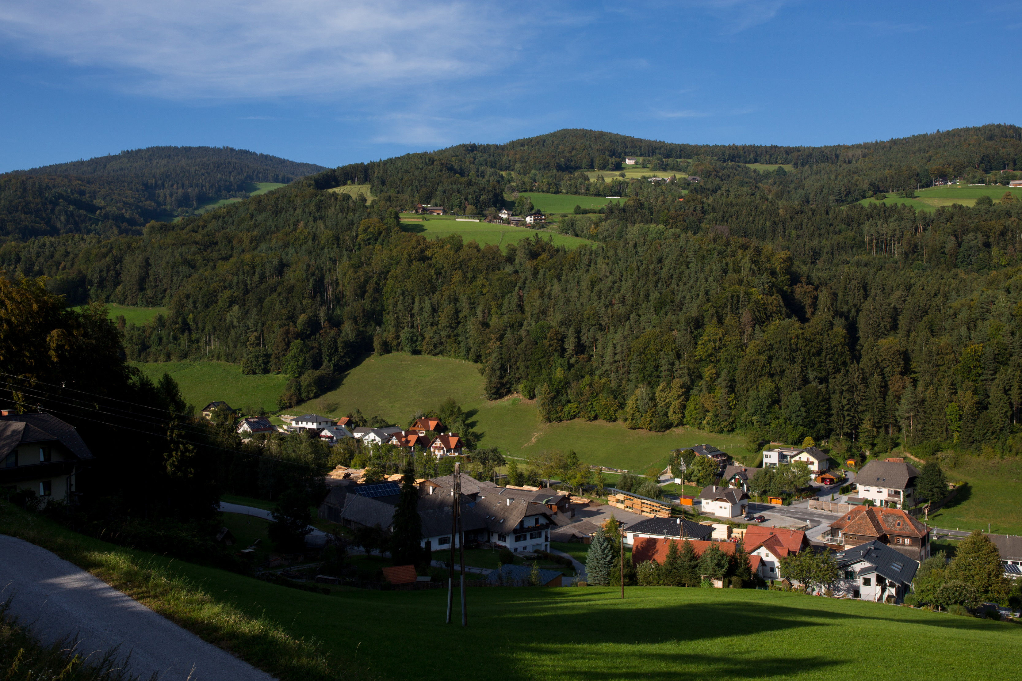 Naas bei Weiz. Steiermark, Austria